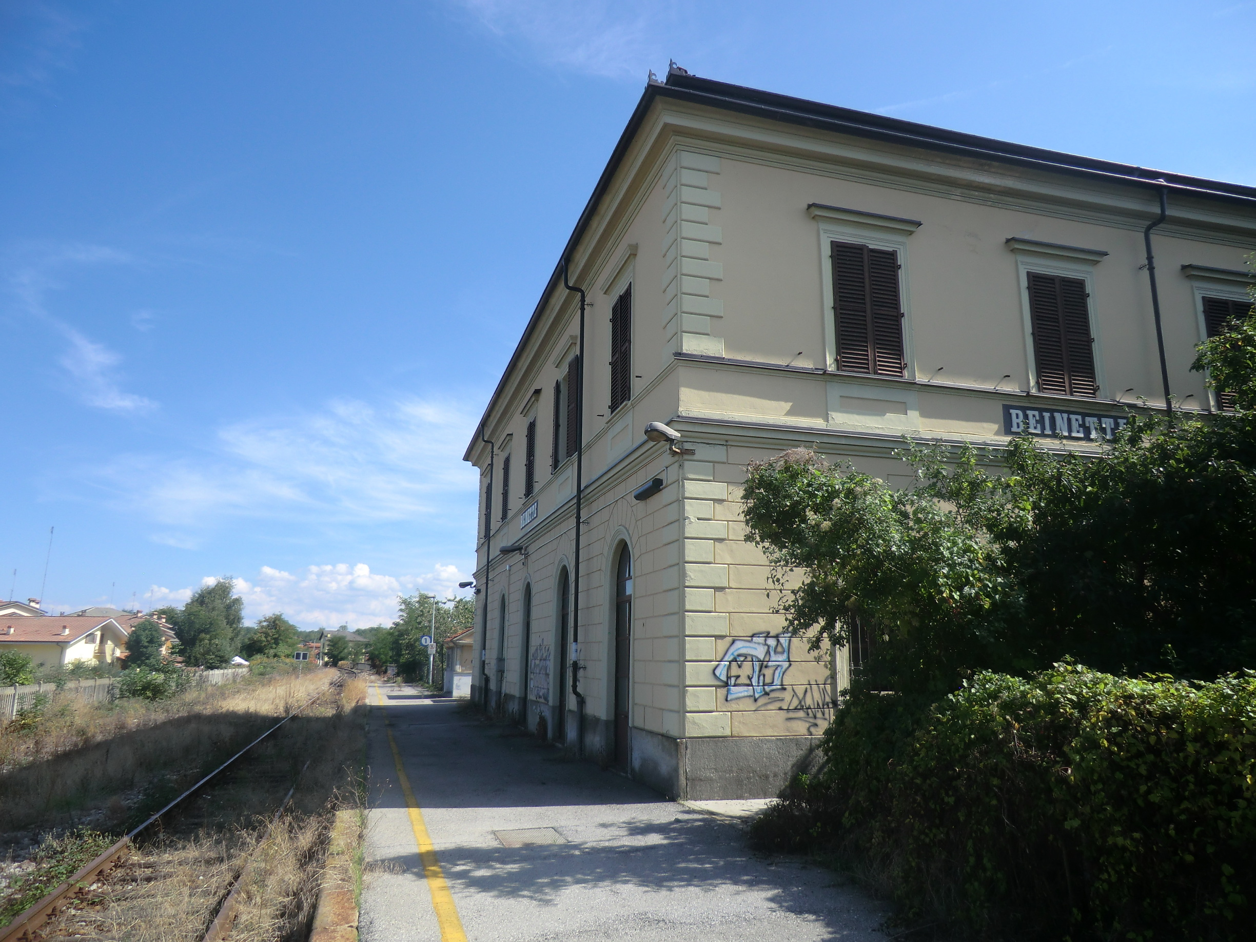 Beinette: stazione ferroviaria linea Mondovì - Cuneo dismessa